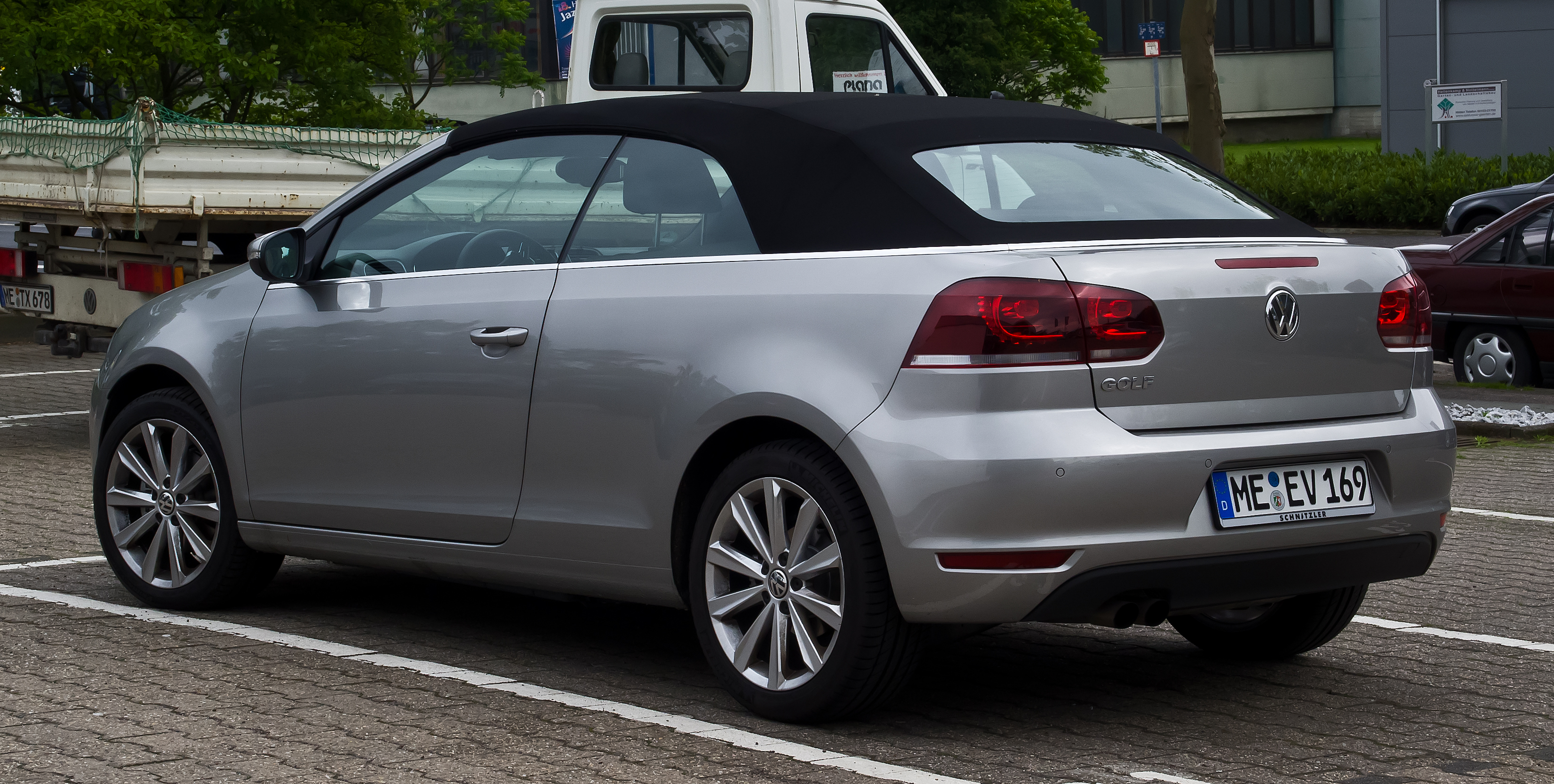 VW Golf Cabriolet 1.4 TSI Design & Style (VI)